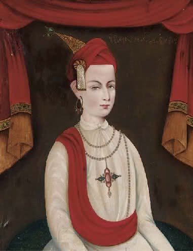 Madhavrao Narayan